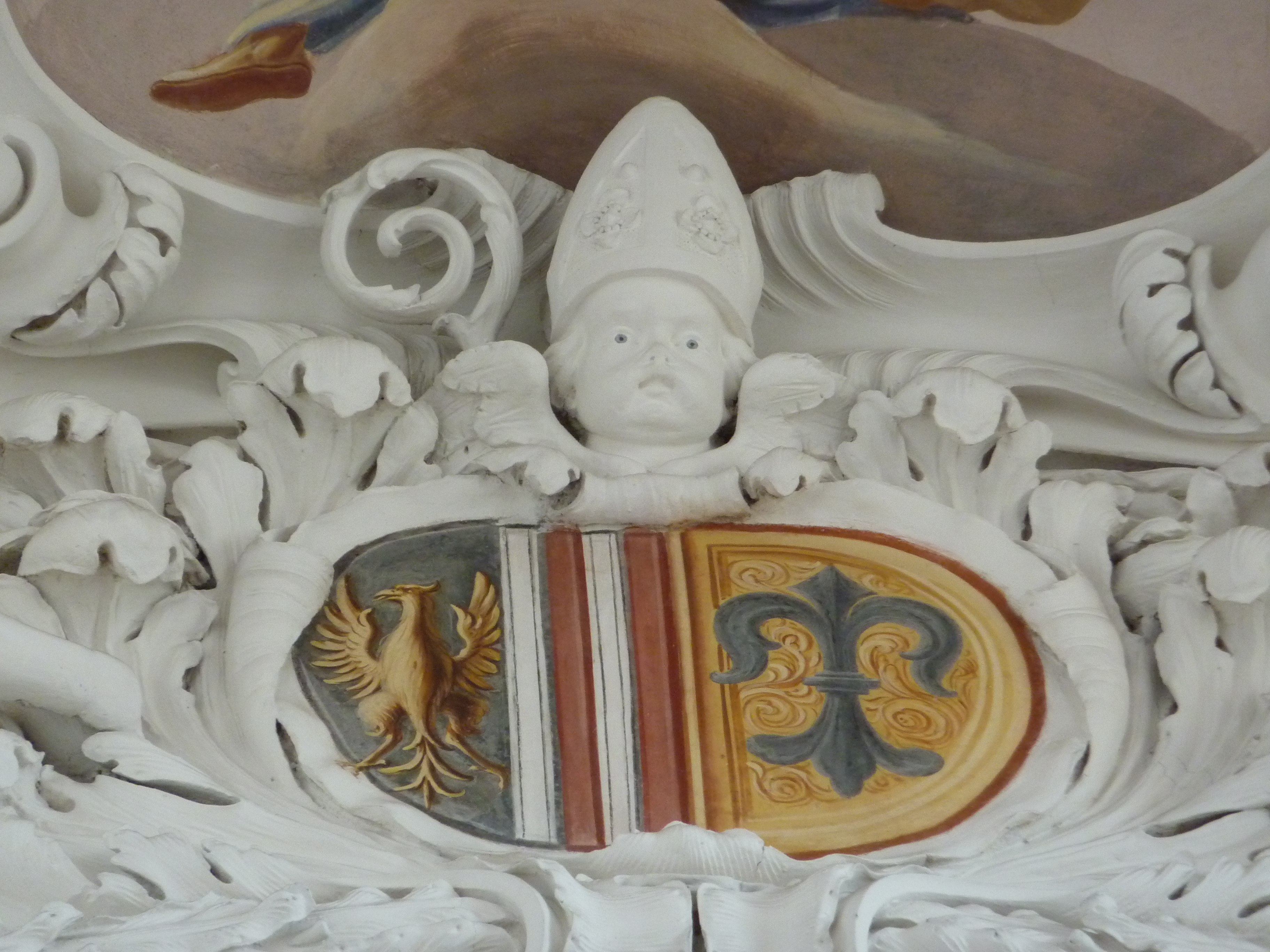 Pfarrkirche Mariä Himmelfahrt, ehem. Zisterzienserstiftskirche, Stift Baumgartenberg, Oberösterreich - Kartusche mit dem Wappenfresko von Abt Candidus Pfyffer am Ostabschluss des Langhauses